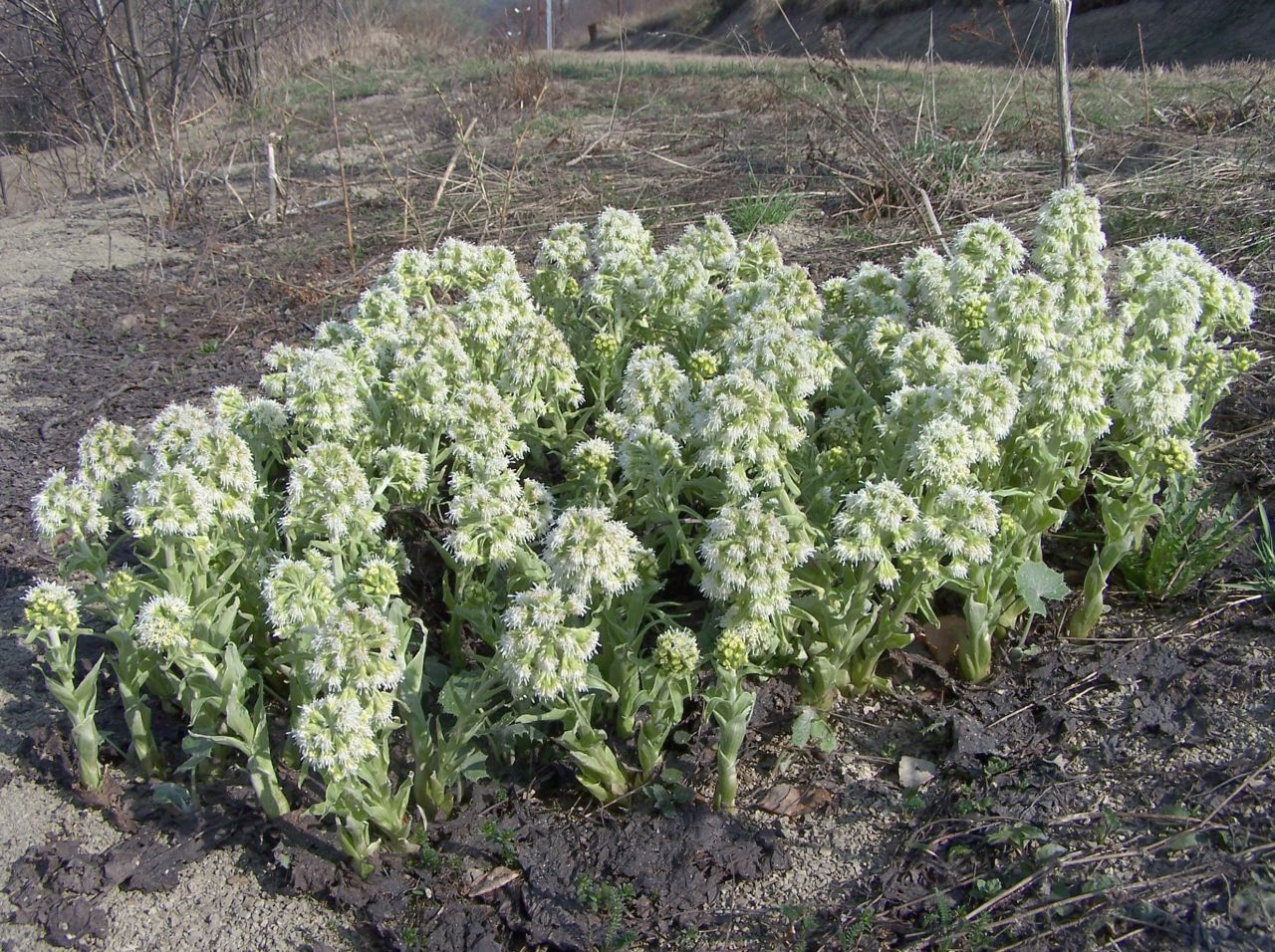 Petasites albus (pl. lepiężnik biały)